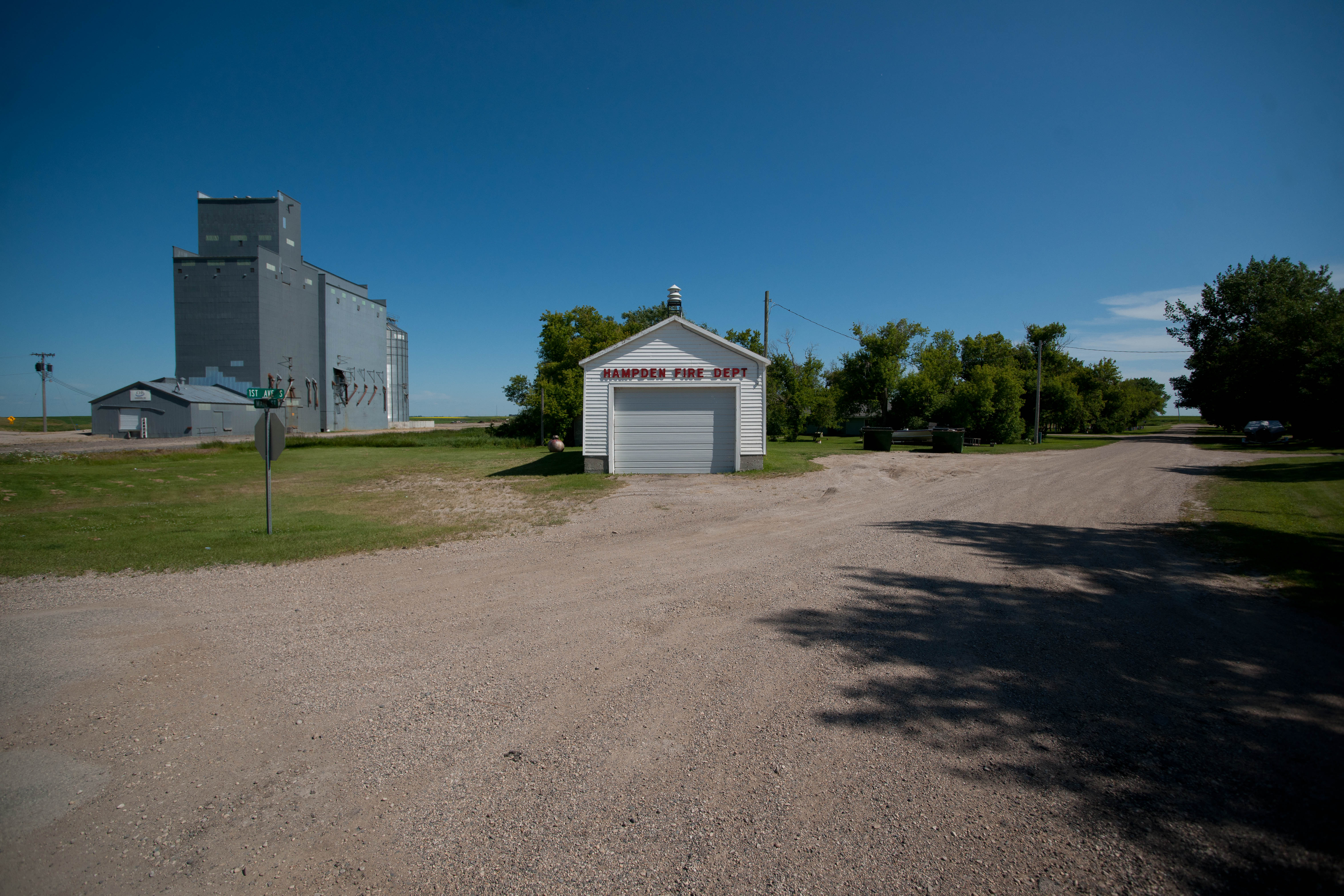 Hampden Fire Department Hampden, North Dakota